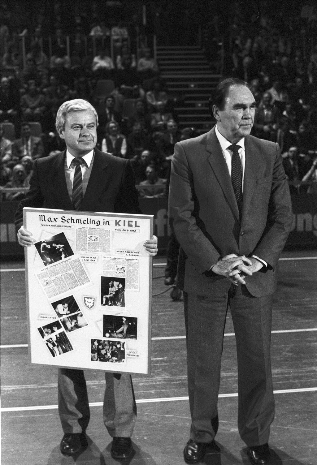 Stadtpräsident Eckhard Sauerbaum (links) überreicht dem ehemaligen Boxweltmeister Max Schmeling (rechts) eine Dokumentation seines letzten Boxkampfes in Kiel 1948.